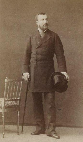 "Comte de Molen, château de Turcey (Côte-d'Or), 23 juillet 1882. Roger Bernard, comte de Molen de la Vernède".